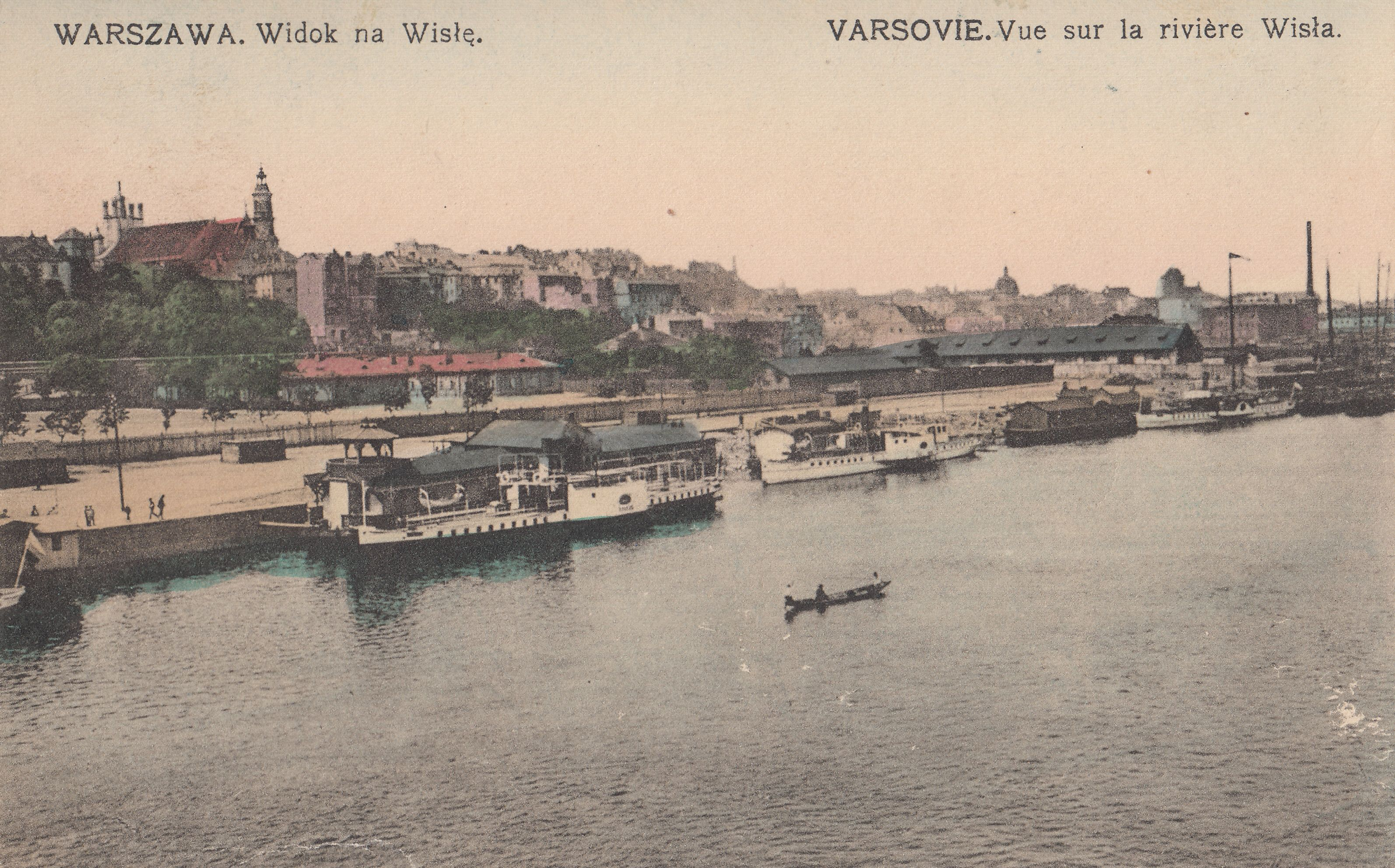 Stare Miasto w Warszawie od strony Wisły